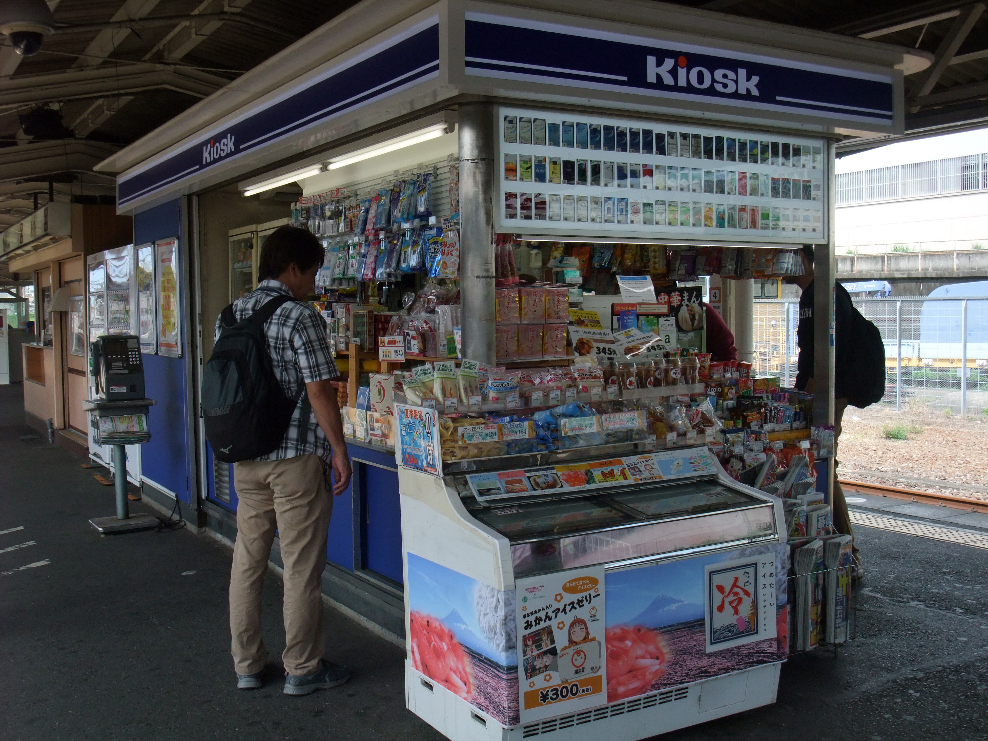 東海道本線三島駅ホームのキオスク